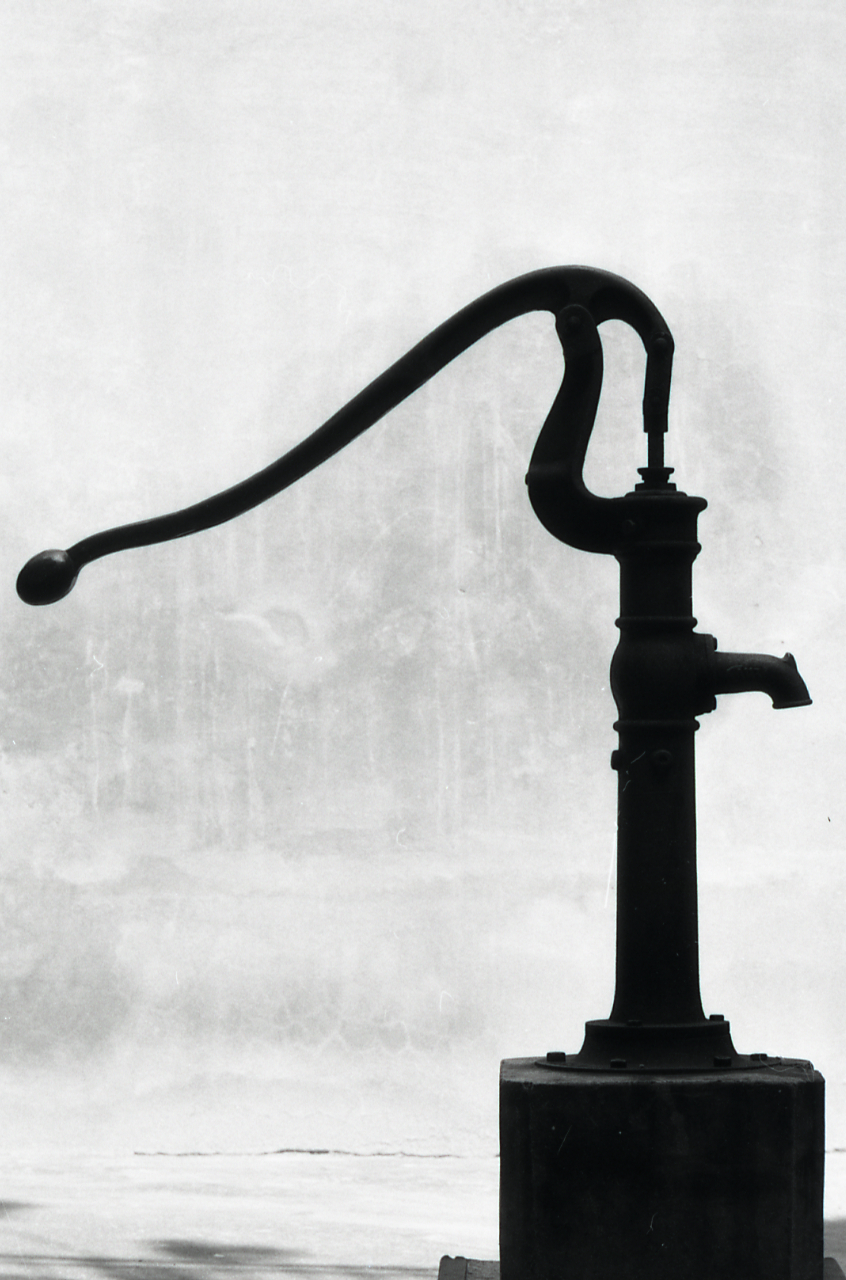 Servizio fotografico : Bologna, 1969 / Paolo Monti. - Strisce: 7, Fotogrammi complessivi: 38 : Negativo b/n, gelatina bromuro d'argento/ pellicola ; 35 mm. - ((I fotogrammi hanno una doppia numerazione. . - Sul portanegativi: Nikon Agfa 21. - Sul dorso del portanegativi Monti specifica: "part. Università". - Occasione: Campagna di rilevamento del centro storico del comune di Bologna. - Fonte: Fattura di Paolo Monti: IV. Commesse/ Fattura (1969/05/09), presso Archivio Paolo Monti. - Fonte: Fattura di Paolo Monti: IV. Commesse/ Fattura (1969/07/31), presso Archivio Paolo Monti. - Fonte: Agenda di Paolo Monti: Monti - Agenda 1969 (1969), presso Archivio Paolo Monti